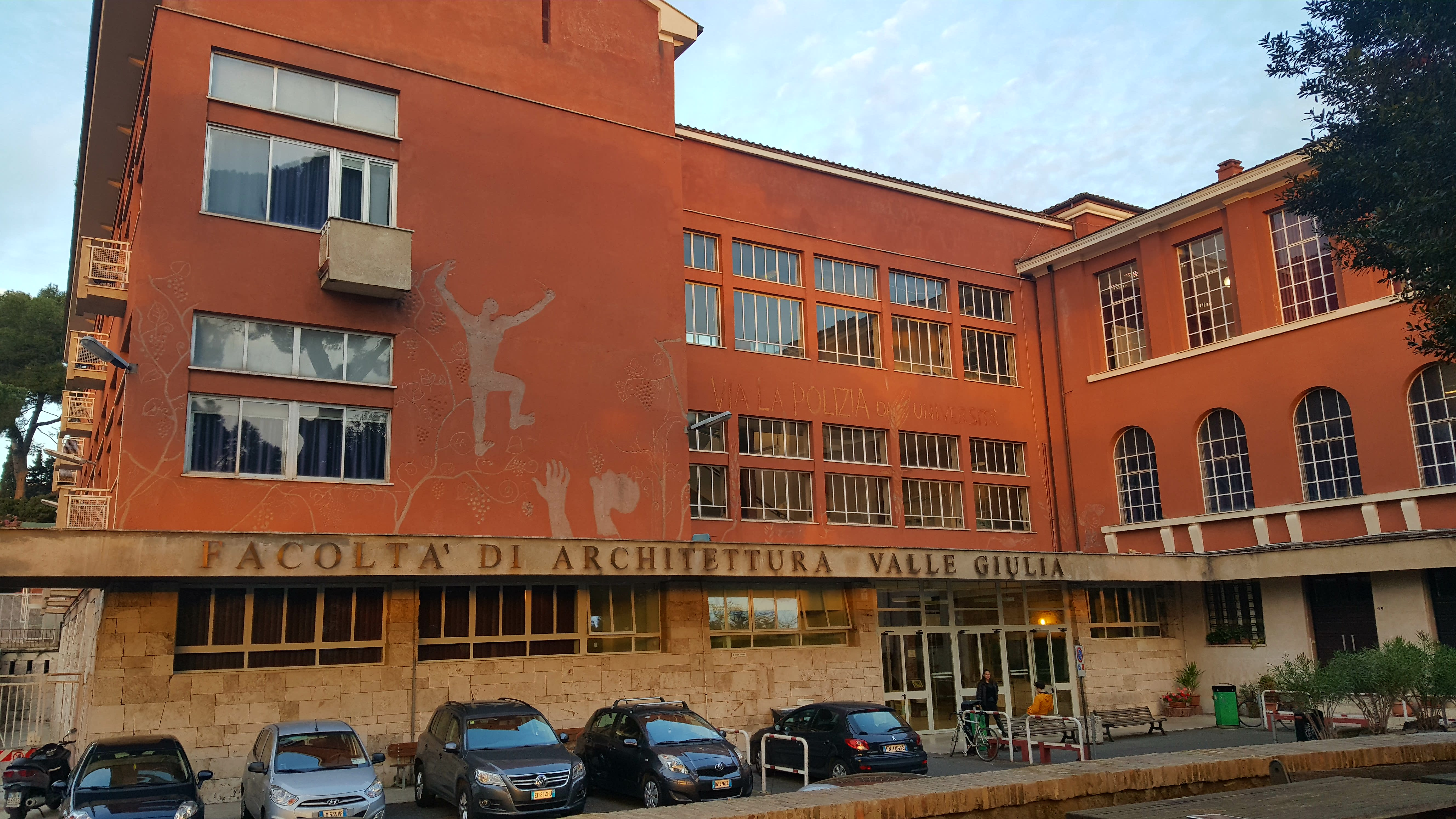 Facoltà di Architettura dell'Università La Sapienza di Roma